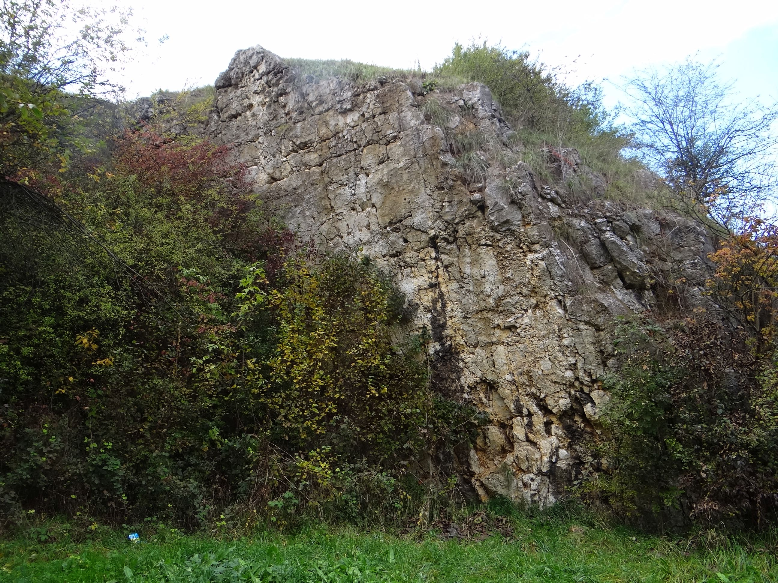 Kamieniołom w Płaszowie